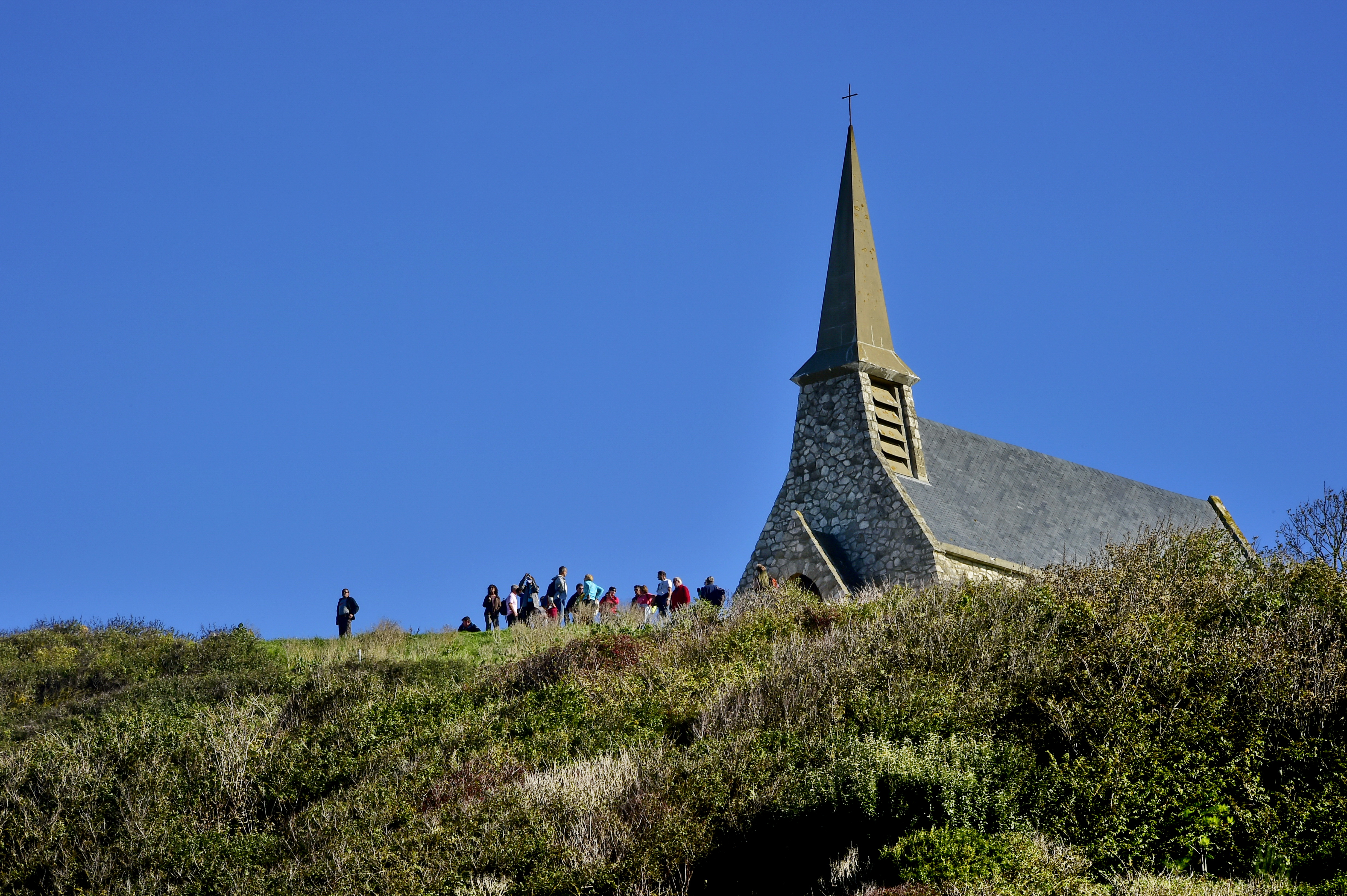 Etretat